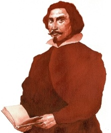 Cartel del IV centenario del nacimiento de Cristóbal de Monroy